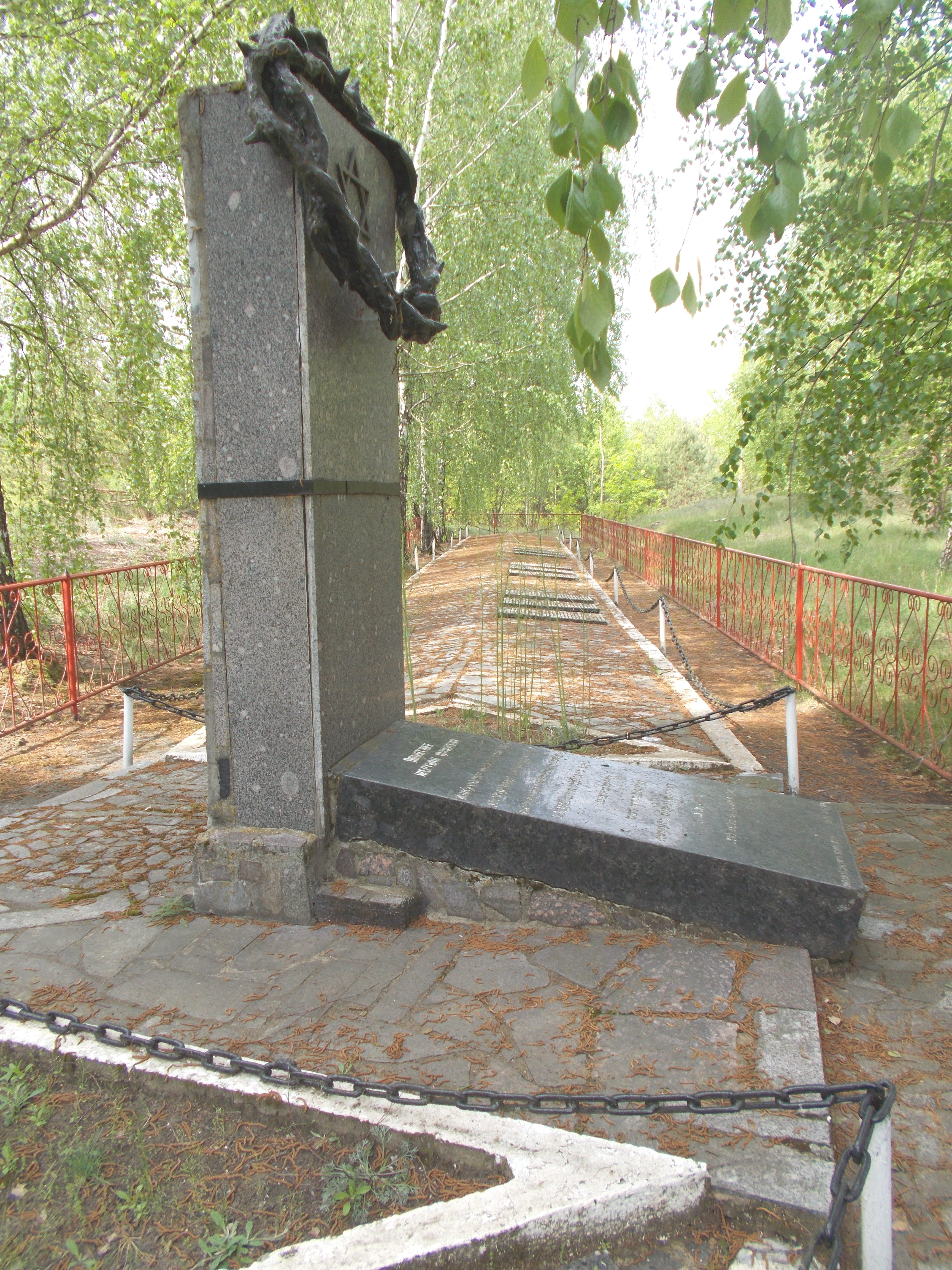 Памятник 1946 евреям Лахвы, убитым нацистами на этом месте 3 сентября 1942 года. Находится на улице Рыбосовхозная.